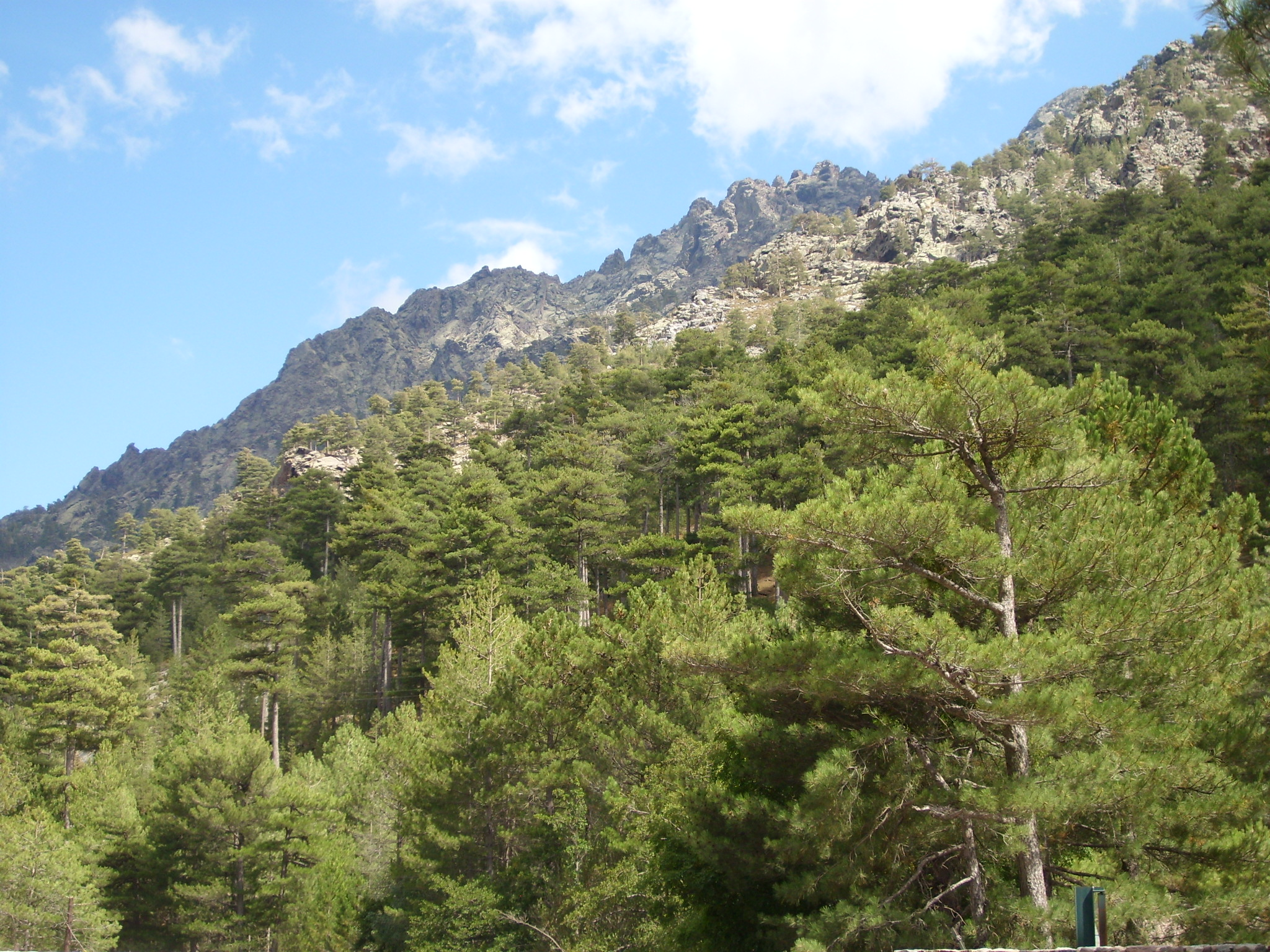 Montagnes dans la vallée d'Asco en Haute-Corse